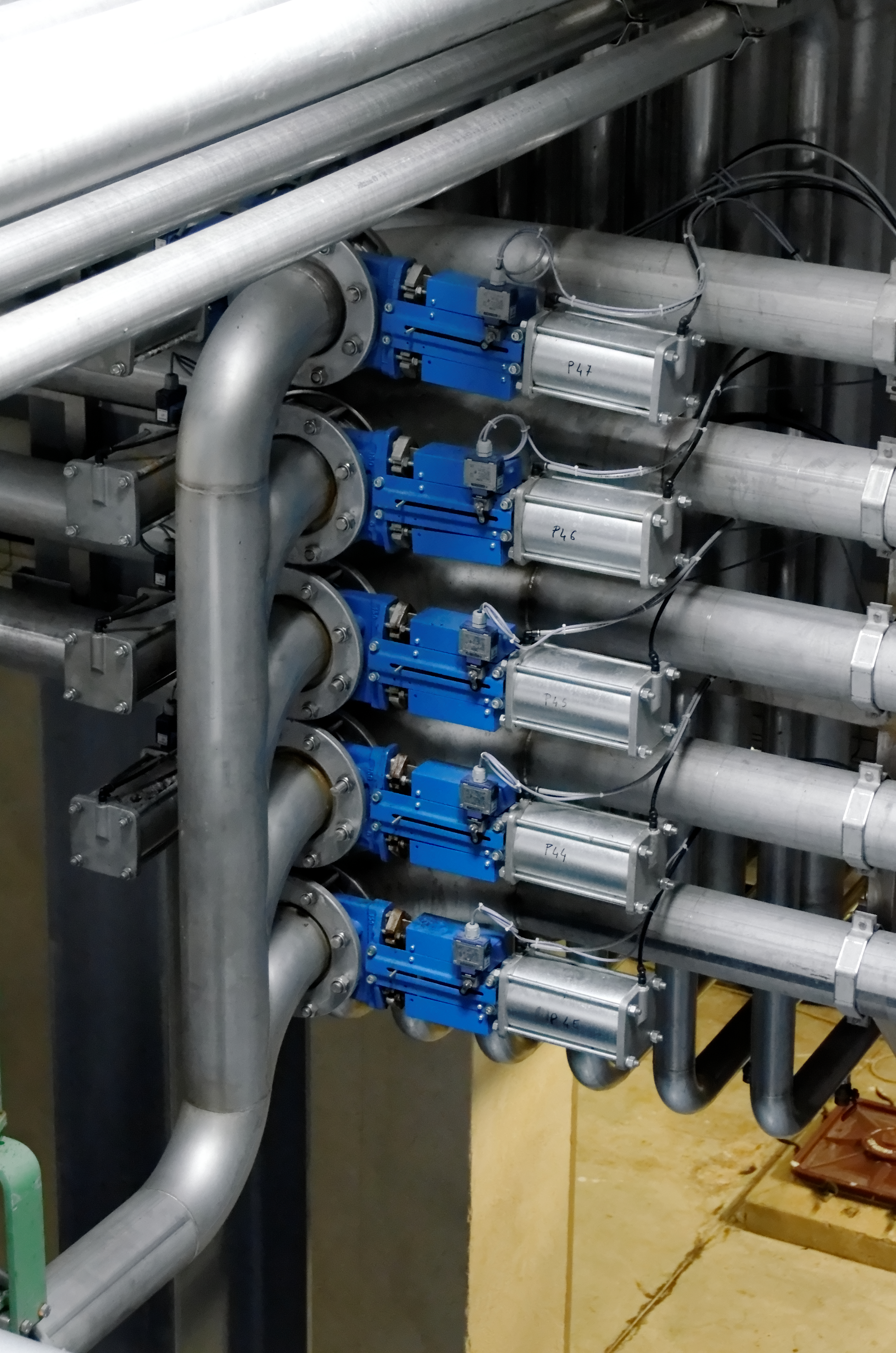 Pneumatic valves